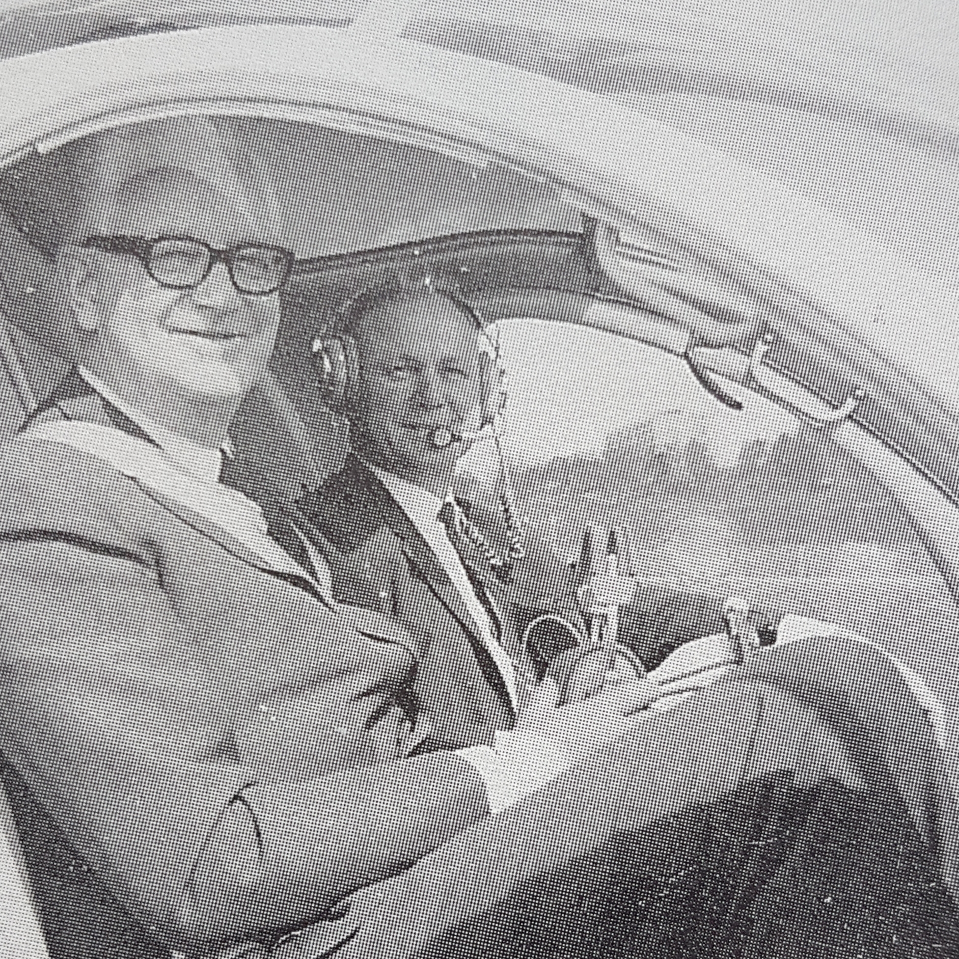 Tryggve Holm VD Saab med okänd pilot